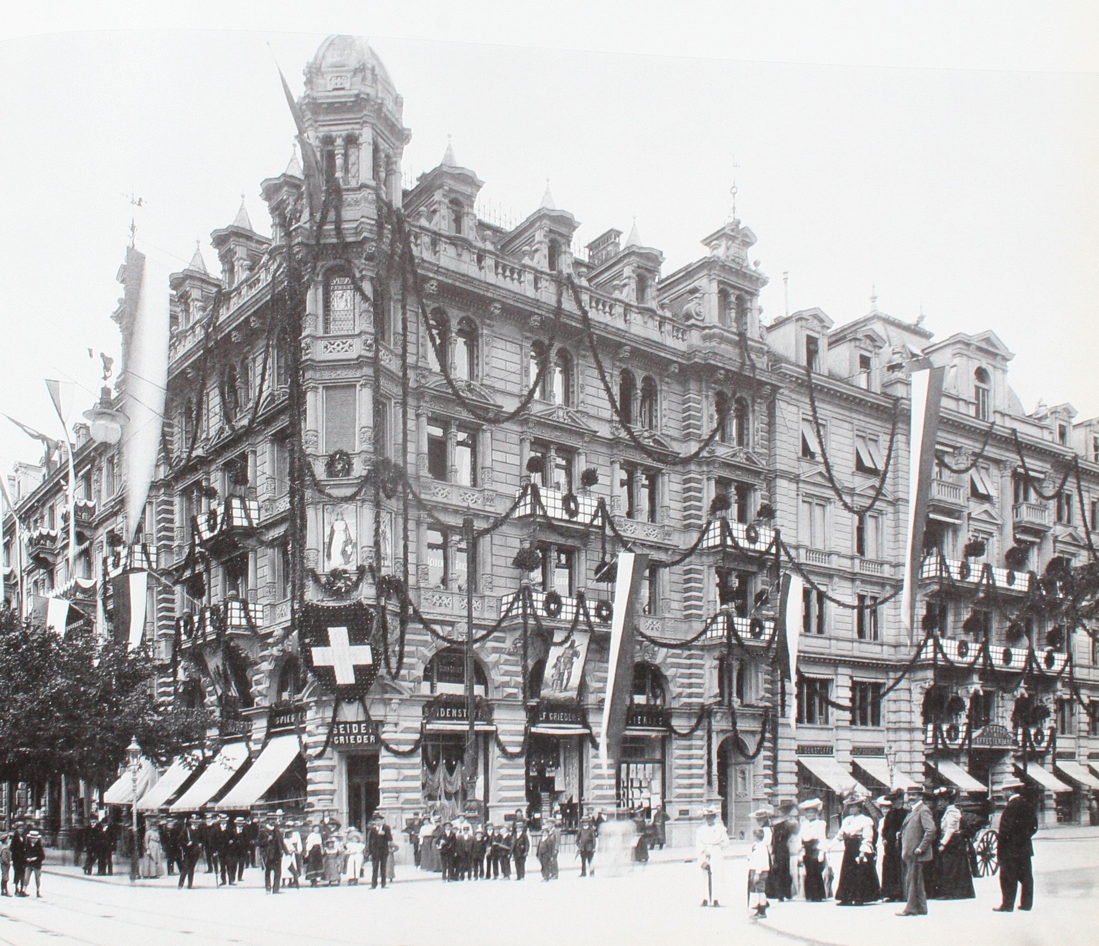 Haus Gryffenberg 1907 geschmückt zum Eidg. Schützenfest